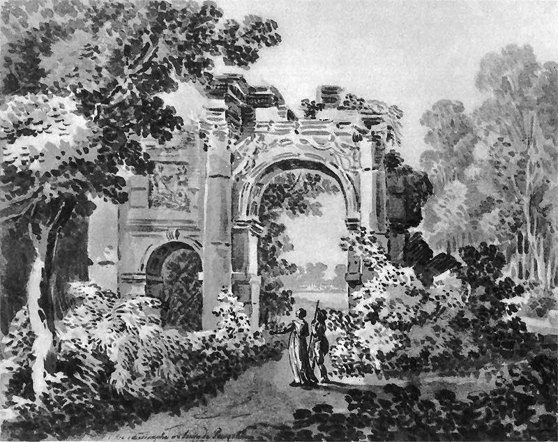 Fragment ogrodu Powązki Czartoryskiej z ruinami łuku triumfalnego. Ok. 1800. Rysunek ołówkiem i pędzlem bistrem. 19,2 x 24,7 cm. Gabinet Rycin Biblioteki Uniwersytetu Warszawskiego